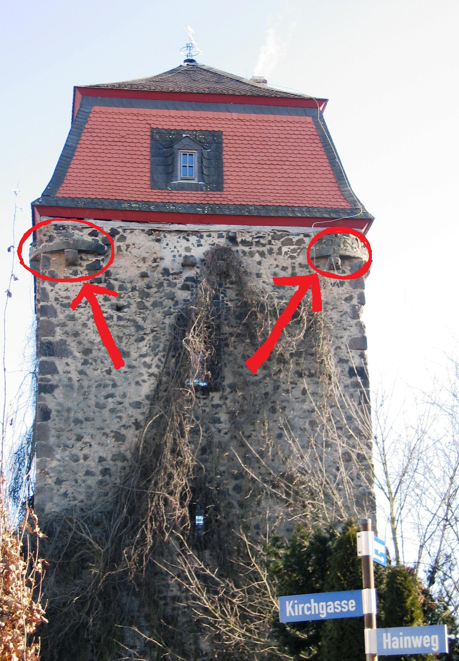 Bild des Schwarzen Turms in Wölfersheim um zu verdeutlichen wo die vier runden Ecktürmchen waren.